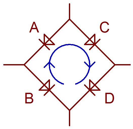 Определение направления pn-переходов в простейшем замкнутом контуре.